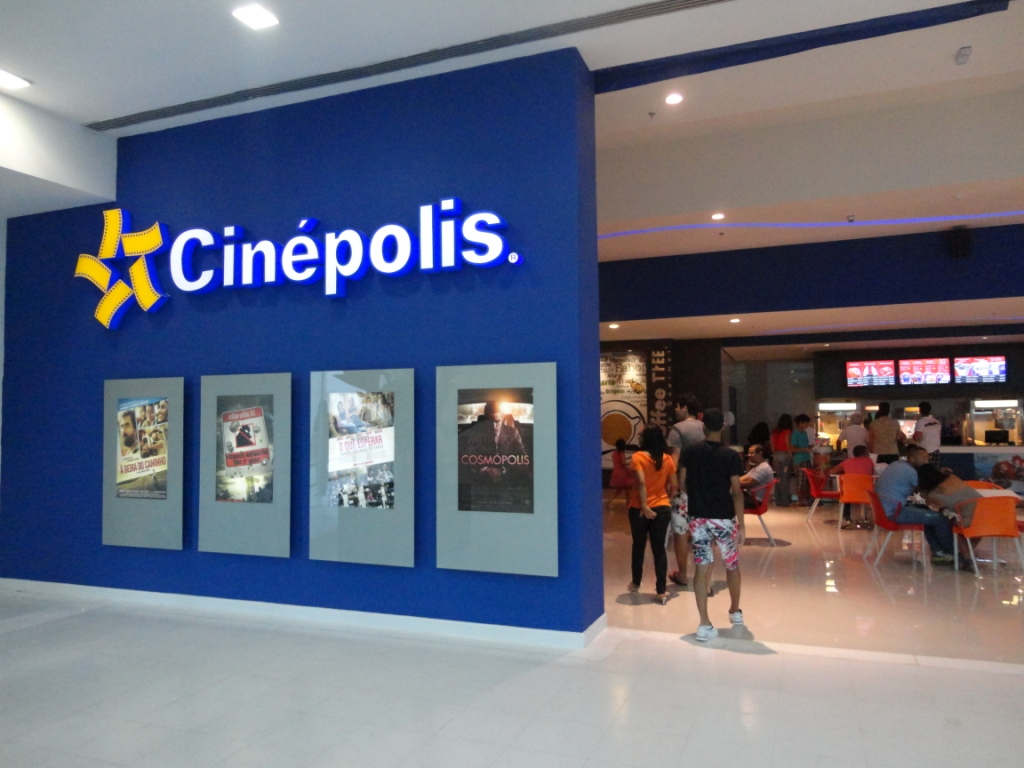 Entrada do Cinépolis no Shopping Bela Vista, de Salvador